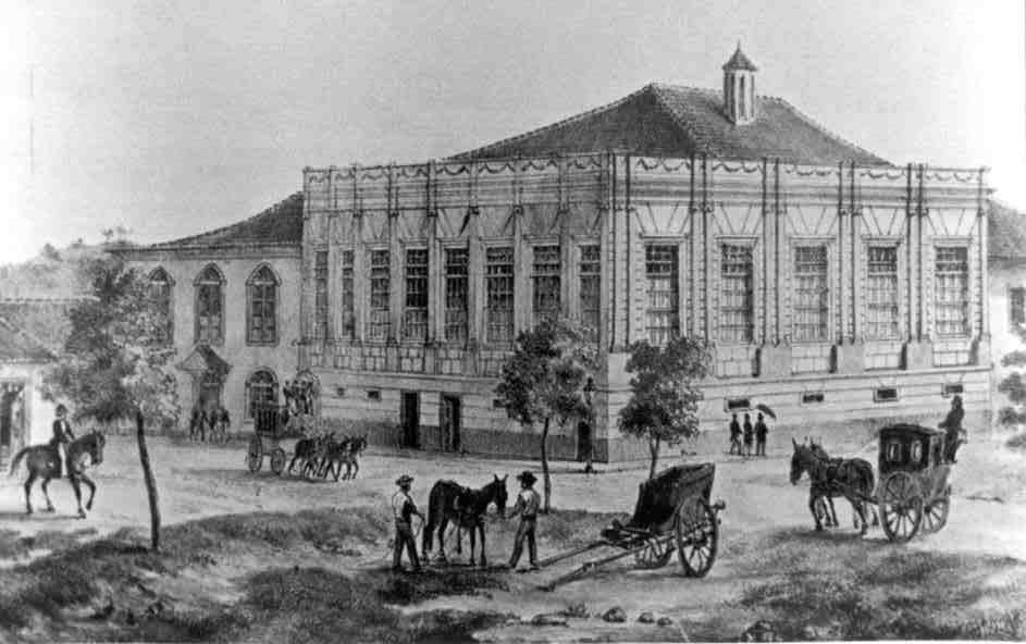 O "Palácio do Conde dos Arcos", no Rio de Janeiro, primeira sede do Senado do Brasil. Litografia do século XIX.